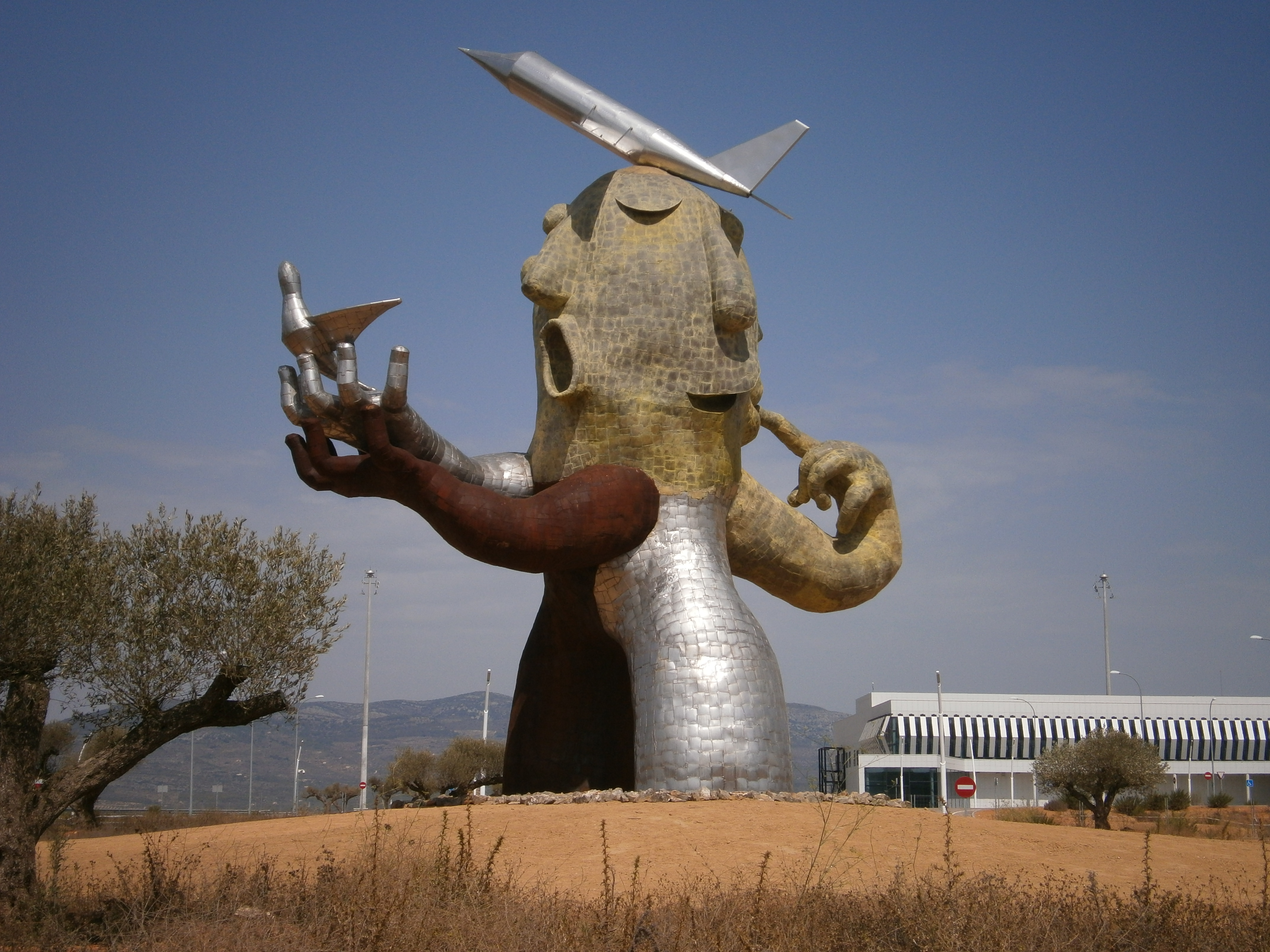 Estatua «El hombre avión» de Juan Ripollés, a la derecha, la Terminal del aeropuerto de Castellón